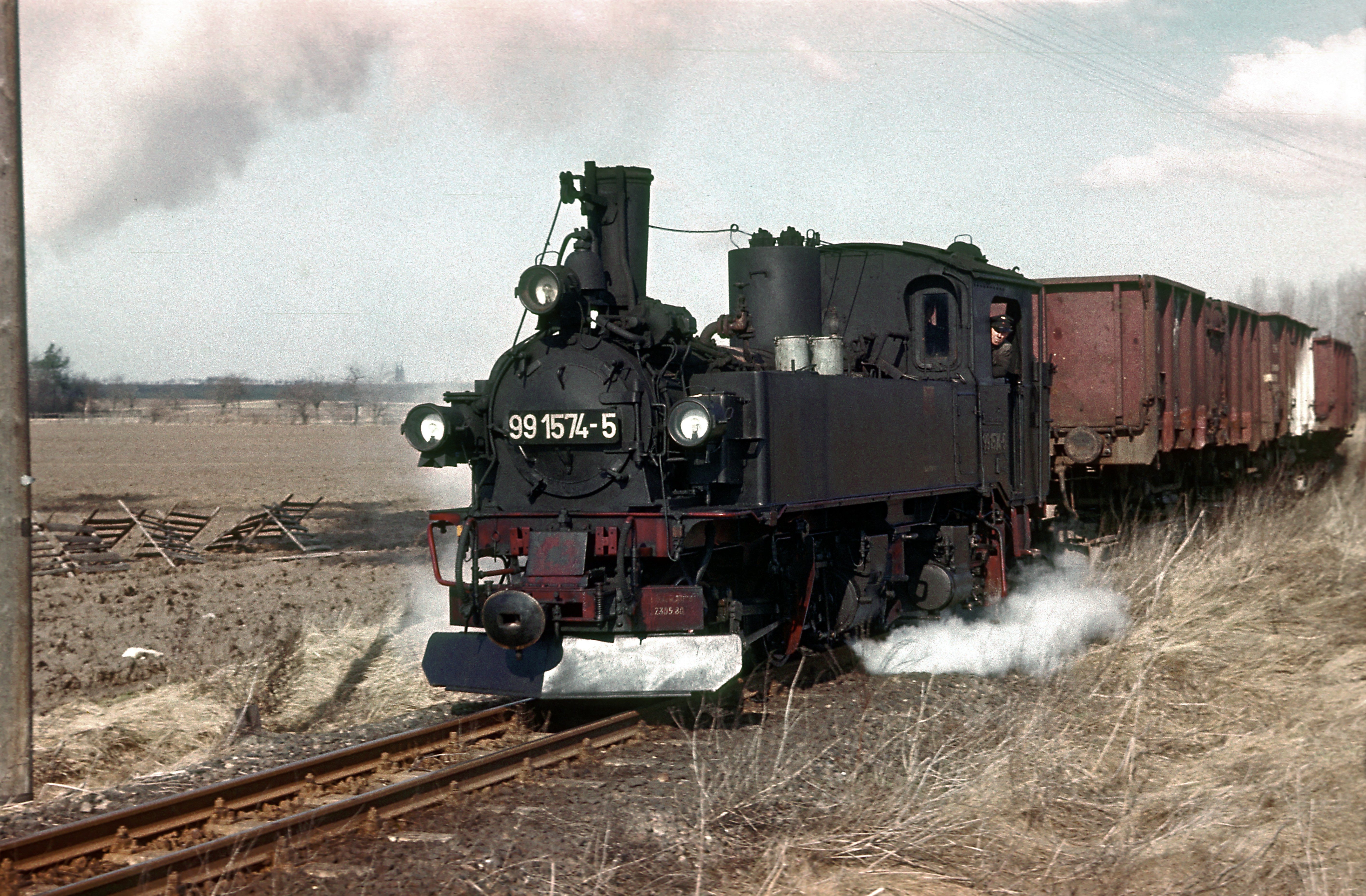 Güterzug Oschatz–Mügeln zwischen Naundorf und Schweta, die Heberleinbremse war drei Jahre später Geschichte. Im Mügelner Netz wurde die Trichterkupplung nie abgelöst, die in den Sechzigern neugebauten Drehgestellrahmen der IV K wurden jedoch konsequent mit der Universalkupplungsaufnahme, die die einfache Umrüstung der Kuppelköpfe ermöglicht, ausgerüstet. Beim Betrieb mit Trichterkuppelkopf oder mit Aufsteckadapter und Rollwagen wird die seitliche Beweglichkeit durch einzusteckende Bolzen auf einen kleinen Bereich begrenzt.